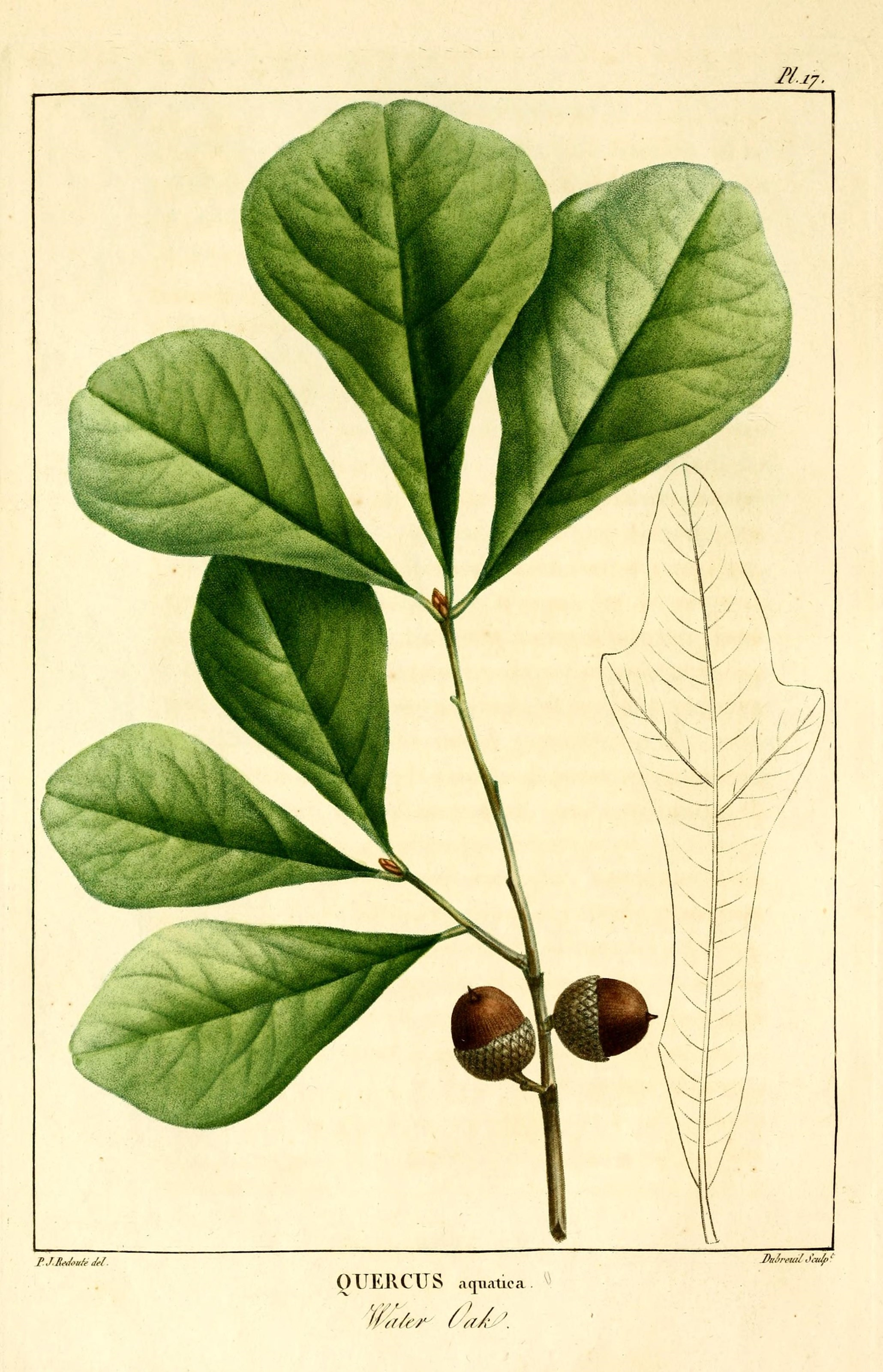 ^/.ly.